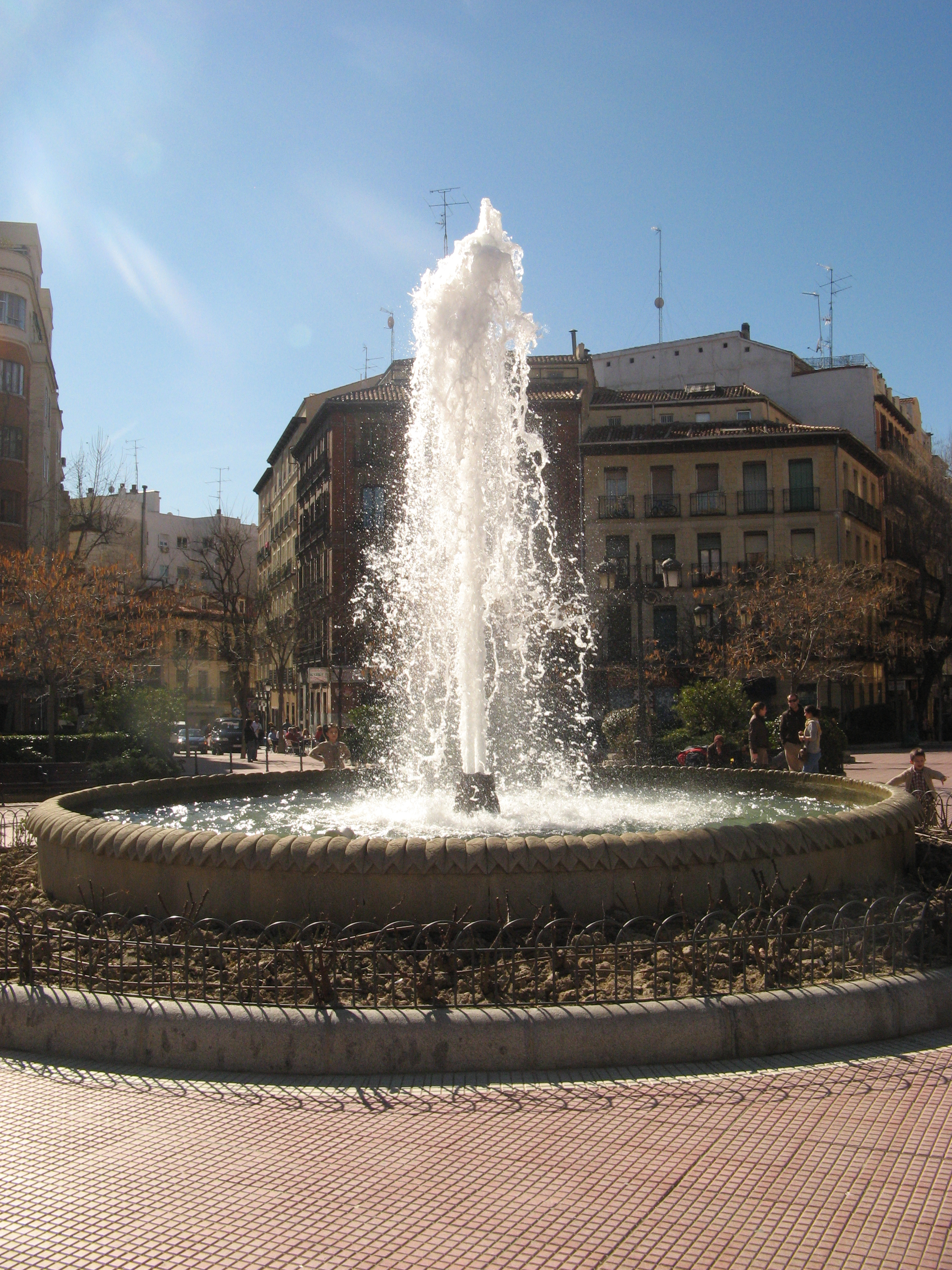 Fuente de Olavide en la plaza de Olavide, Madrid.